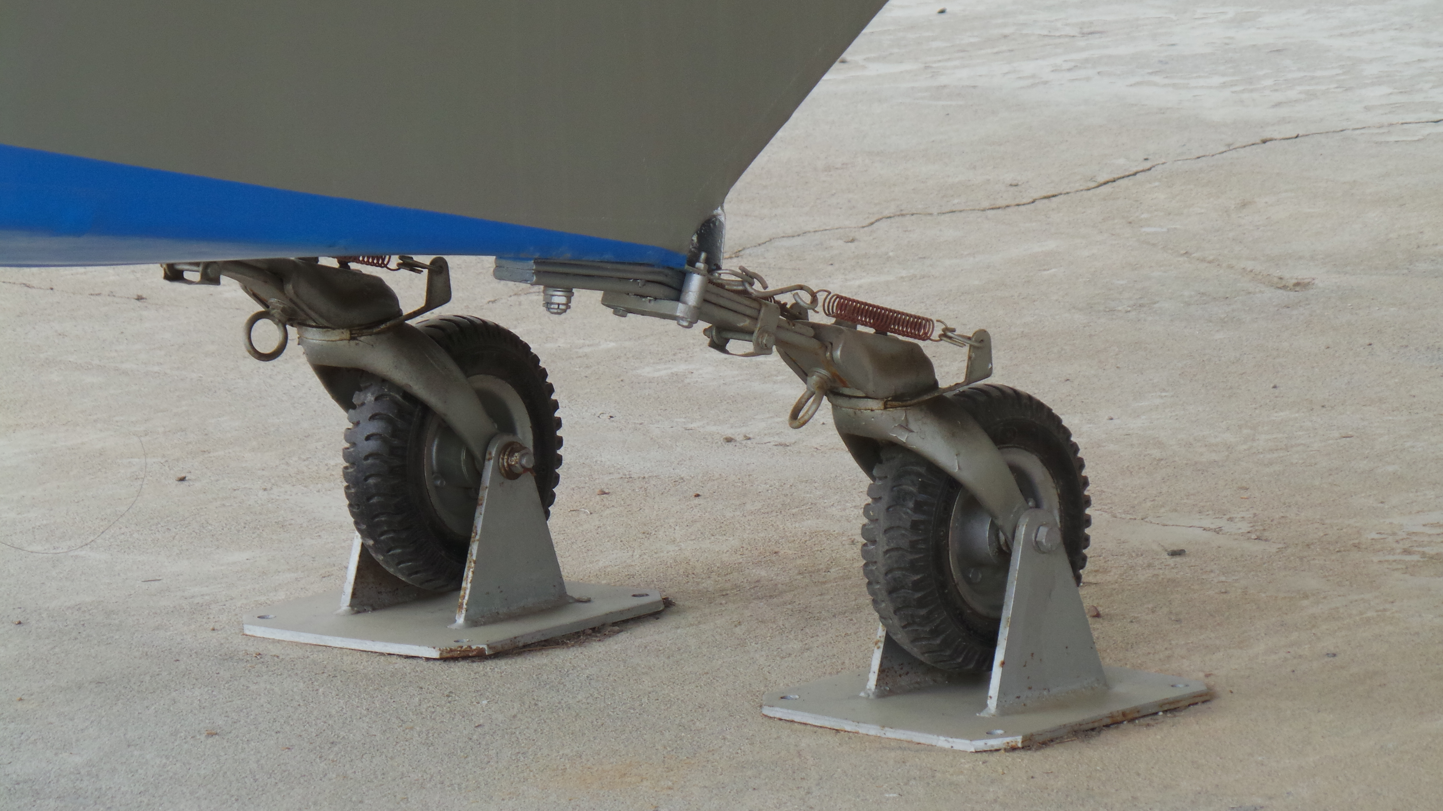 공군사관학교 박물관에 전시중인 부활호 복원기의 꼬리바퀴